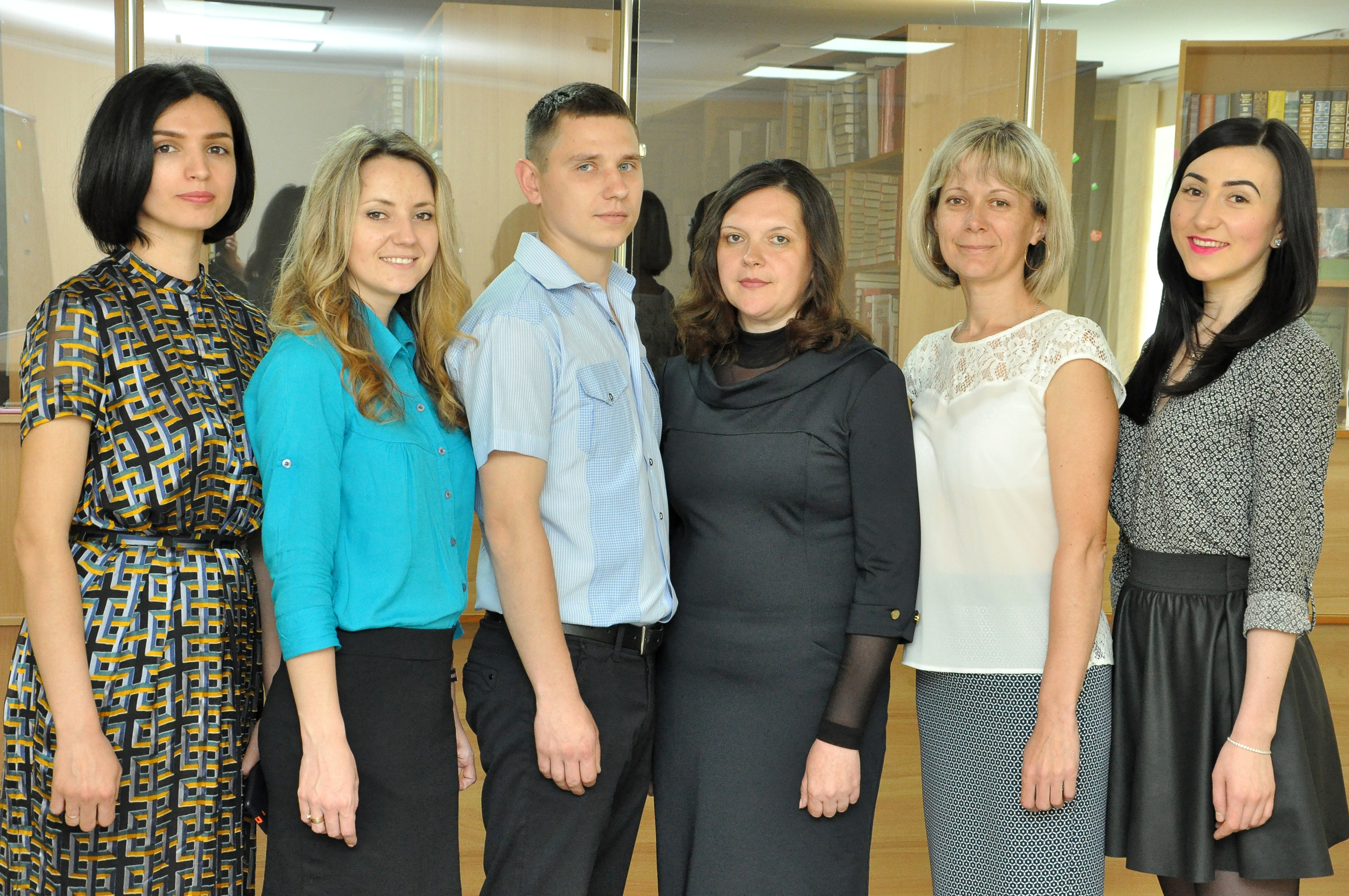 Підготовче відділення для іноземців та осіб без громадянства Тернопільського державного медичного університету імені І. Я. Горбачевського. Педагогічний колектив (зліва направо): біології — Оксана Гром, хімії — Оксана Тарасюк, невідомий, завідувачка підготовчого відділення — Лариса Наліжита, української, російської мови та країнознавства — Надія Гамуга, української мови — Марина Тимощук.